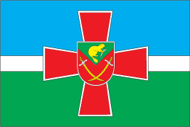 Прапор Бобровицького району